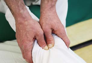 Presiones de Shiatsu